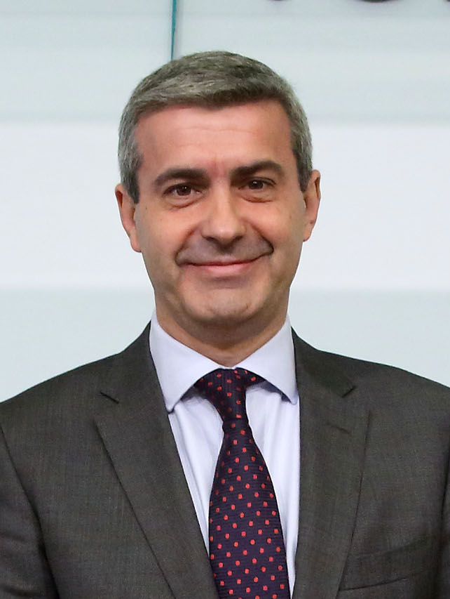 Toledo, 4-05-2018.- Toledo, 4-05-2018.- La consejera de Bienestar Social, Aurelia Sánchez, renueva el convenio de colaboración con la Diputación de Toledo sobre servicios y ayudas de urgencia en situaciones de necesidad o vulnerabilidad social infantil. En la imagen, junto al presidente de la corporación provincial, Álvaro Gutiérrez y el presidente de Cruz Roja Toledo, Juan Carlos Santos (d), tras suscribir el convenio. (Foto: Álvaro Ruiz // JCCM)